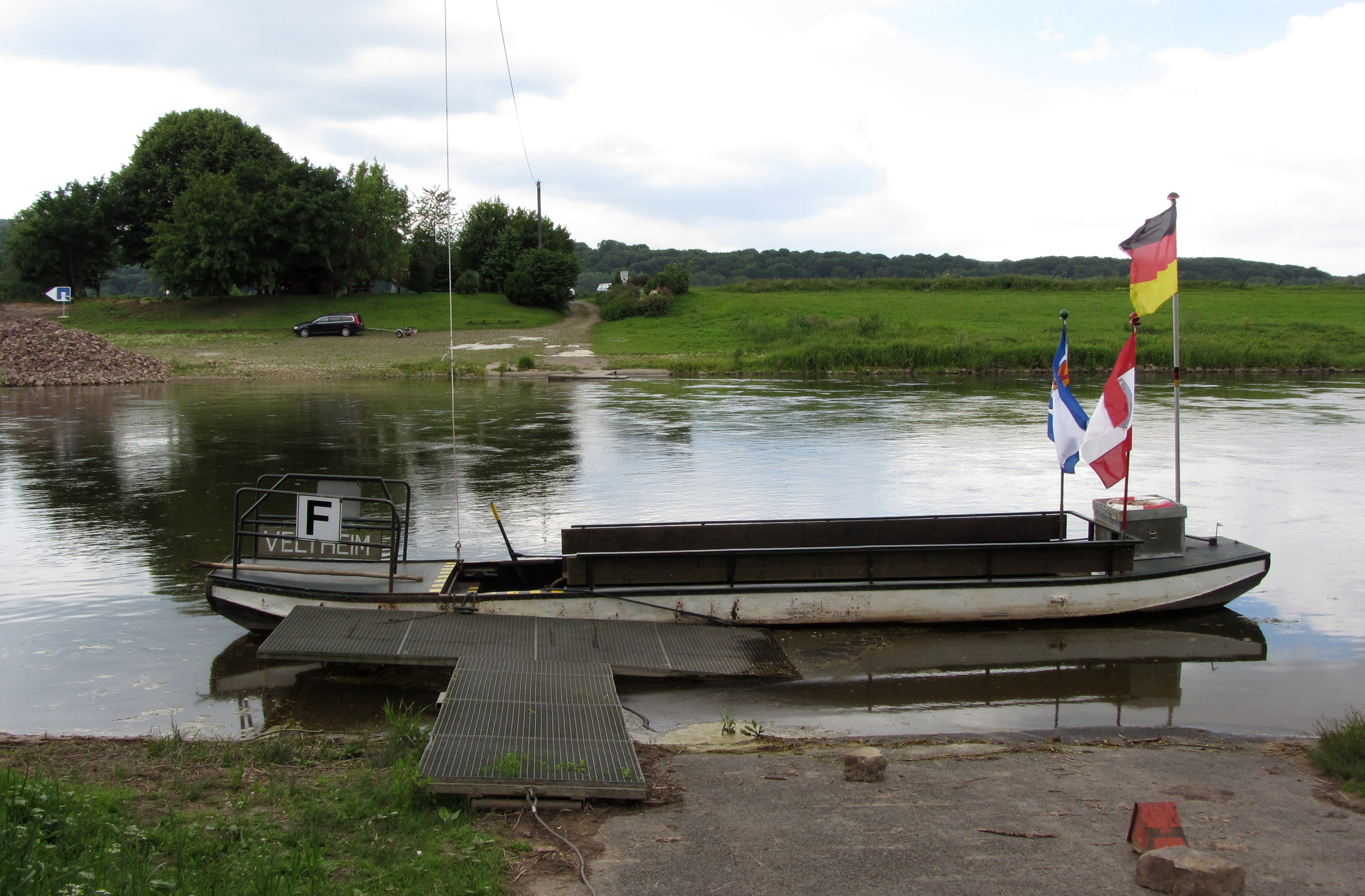 Porta Westfalica-Veltheim. Hochseilfähre für Fußgänger und Radfahrer über die Weser.